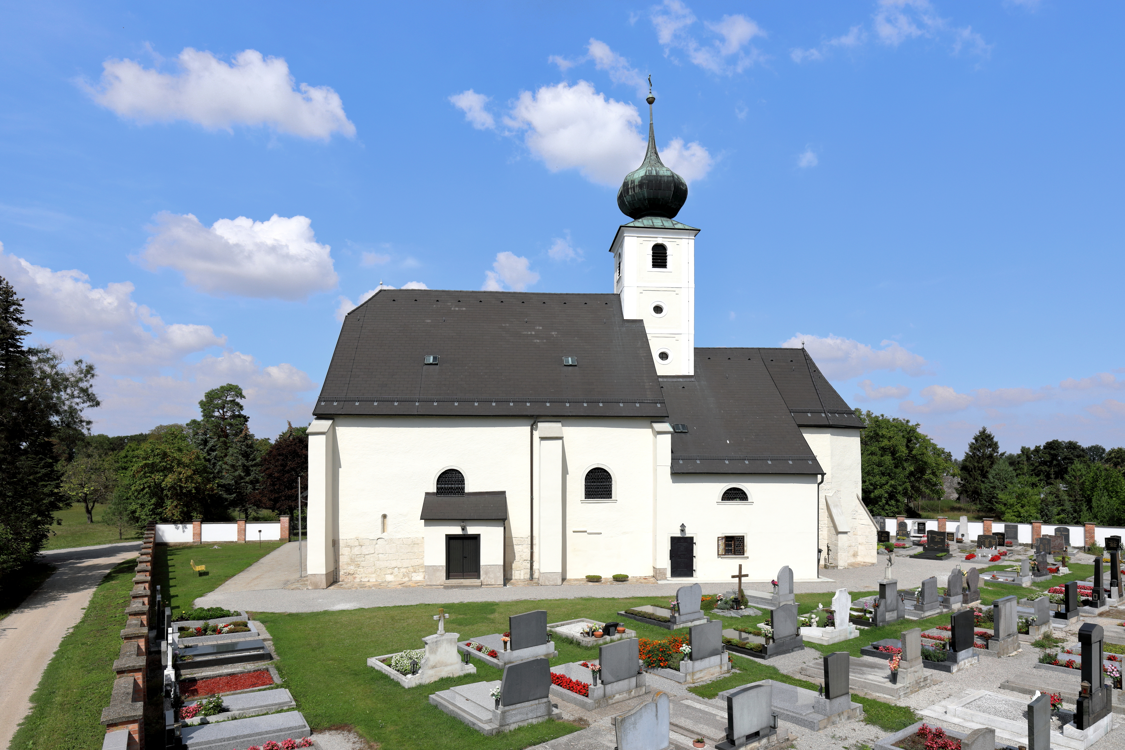 Südsüdostansicht der Pfarrkirche hl. Leonhard in der niederösterreichischen Marktgemeinde Eckartsau.Einer im Kern spätmittelalterlicher Sakralbau, der unter Beibehaltung des im Kern gotischen Chores und des vorgegebenen Grundrisses 1703 barockisiert wurde. Die im Süden angebaute zweigeschossige Sakristei wurde im 18. Jahrhundert errichtet.